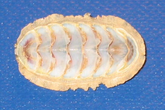 Käferschnecke (Chiton), Skelett, von unten, Curd Wallhäußer, selbst fotografiert